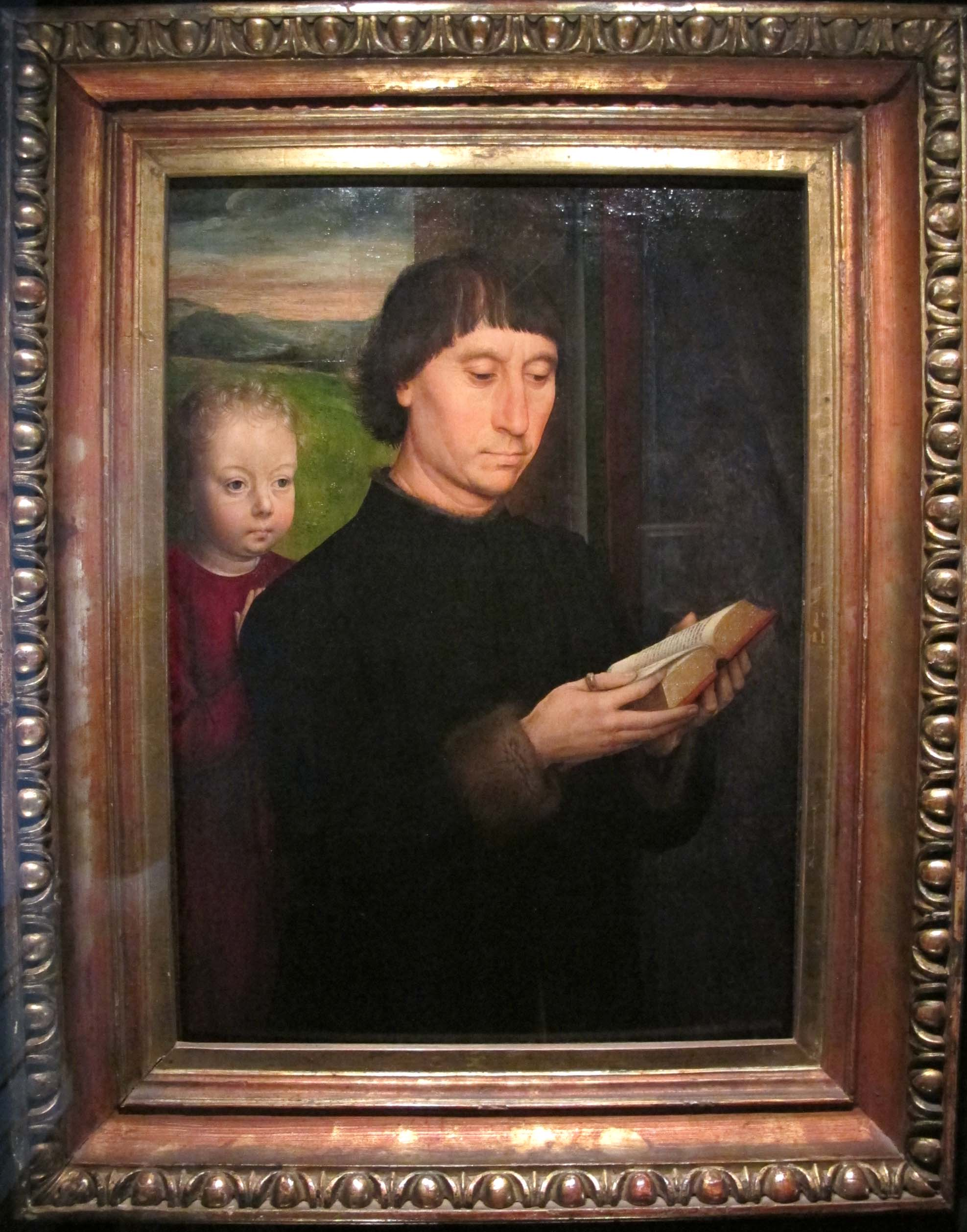 Hans memling, ritratto d'uomo leggente